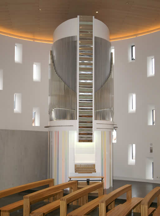 Ansicht der Vleugels-Orgel in der Pfarrkirche St. Valentin in Limbach